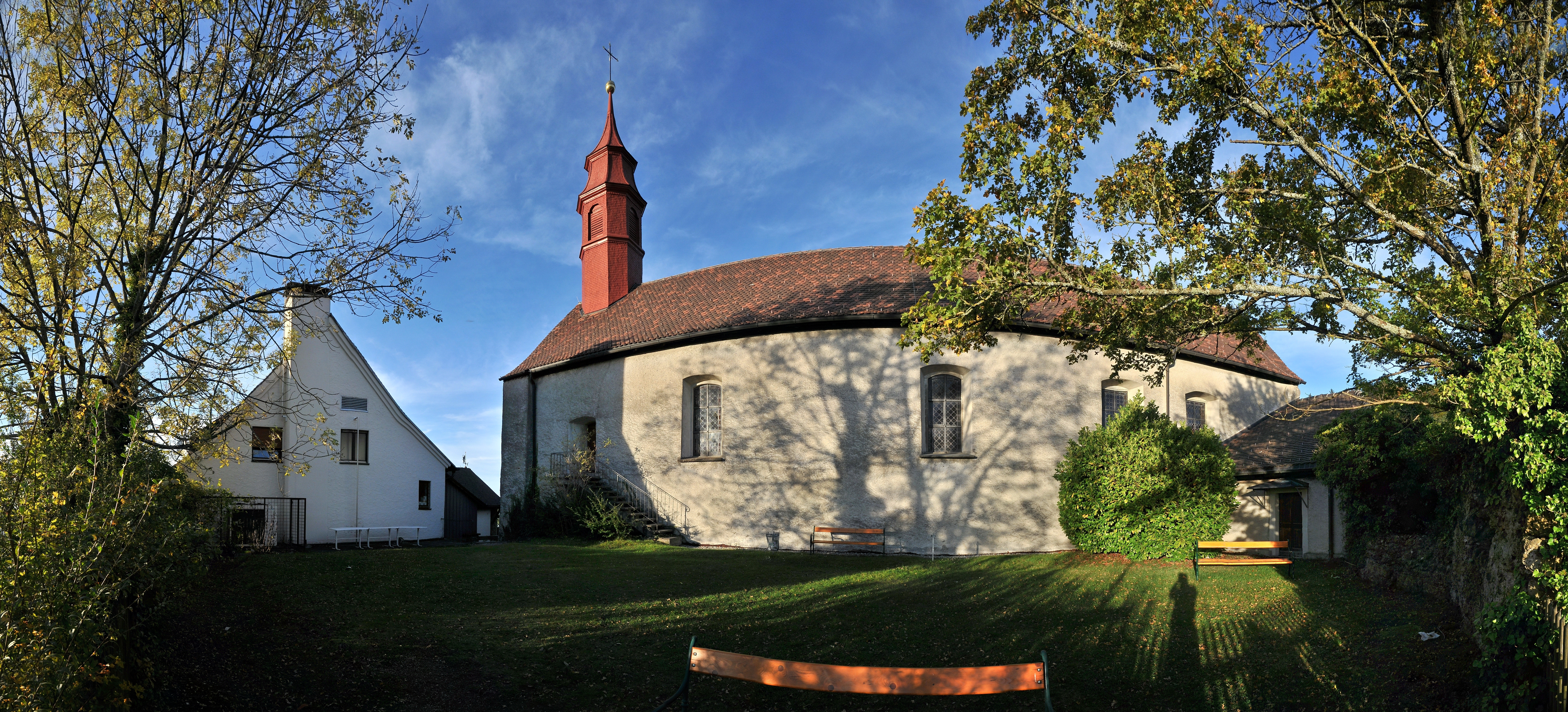 Wallfahrtskirche St. Gebhard. Sie steht neben der Burg Hohenbregenz auf dem Gebhardsberg bei Bregenz.